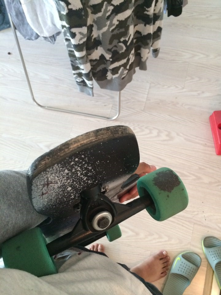 내 보드임